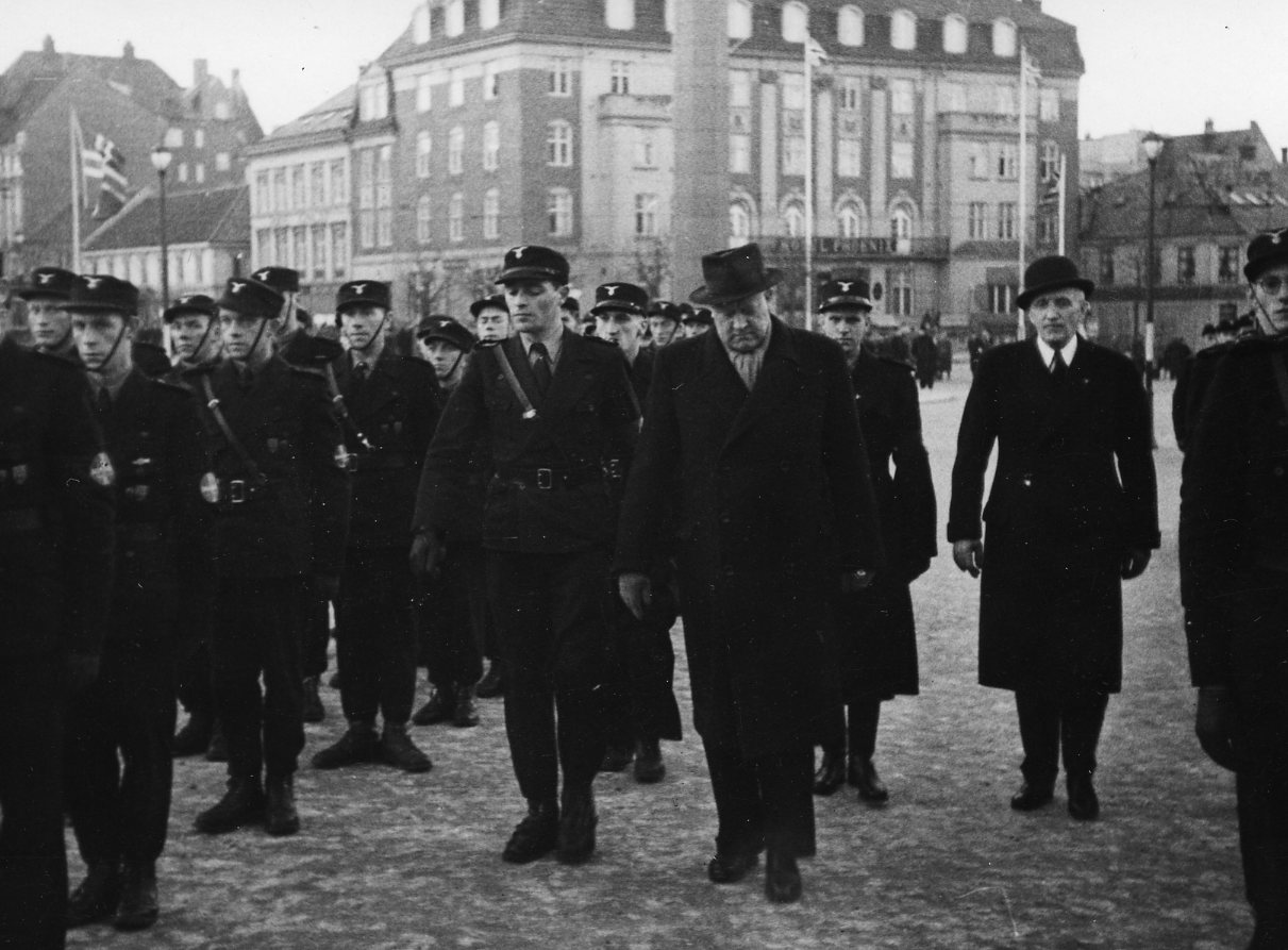 RA/RAFA-3309/U 38B/10/38-10-32 img151 Nasjonal Samling, forkortet NS, var et norsk politisk parti som ble grunnlagt av Vidkun Quisling i 1933 og ble oppløst ved frigjøringa i 1945. Ideologisk fulgte partiet den tyske nasjonalsosialismen tett, og NS ble støtteorganisasjon for den tyske okkupasjonsmakta i Norge under andre verdenskrig.